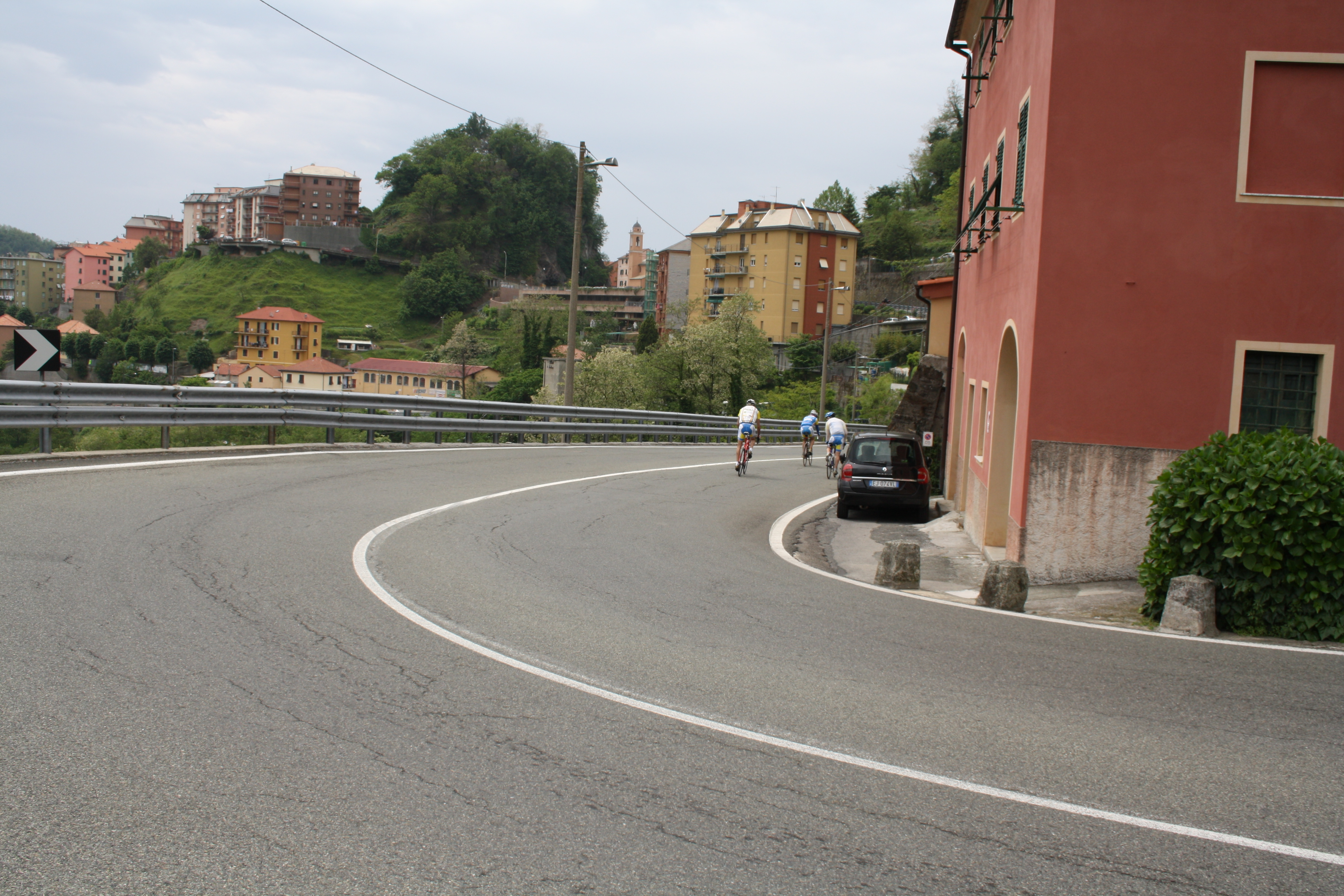 Insediamenti recenti a Mele, visto dal torrente della Biscaccia